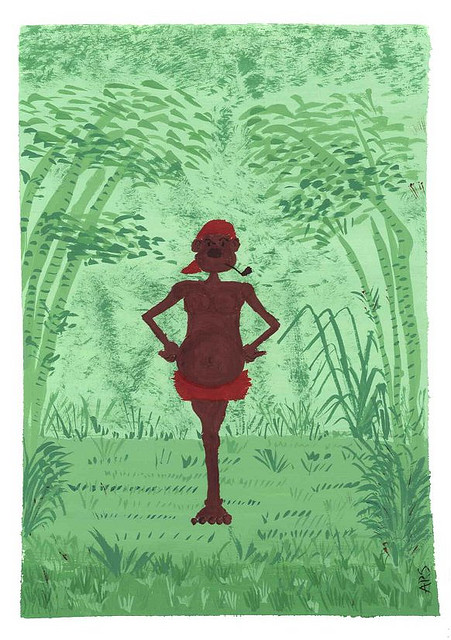 Saci, guache sobre papel.